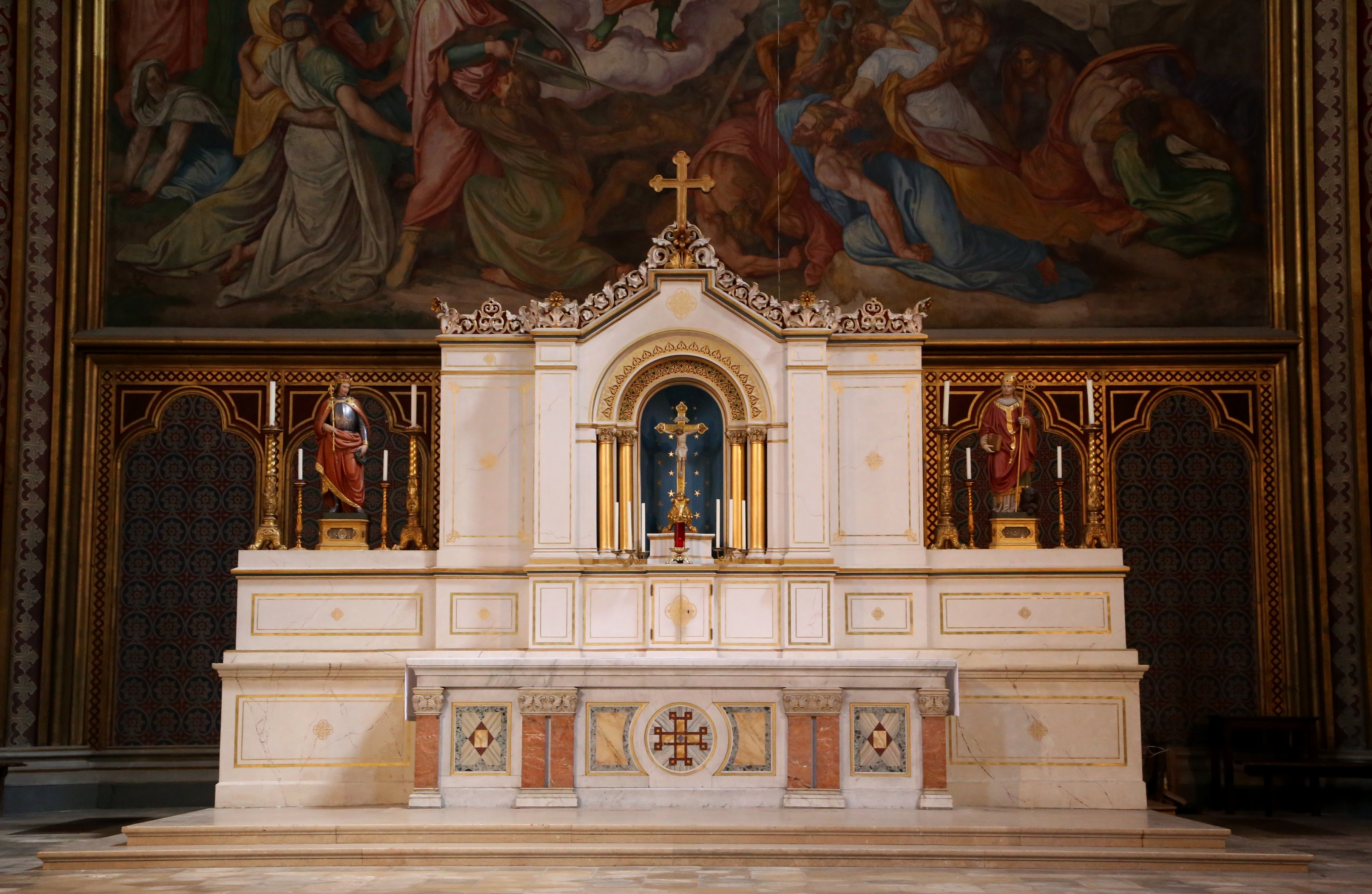 Hochaltar in St. Ludwig, München